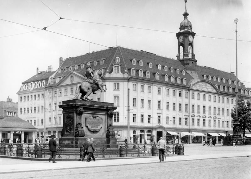 Dresden, August der Starke-Denkmal mit Neustädtischem Rathaus